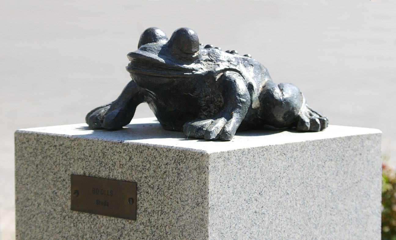 Groda, Konstverk av Bo Olls, placerat vid södra entrén, US, Linköping.